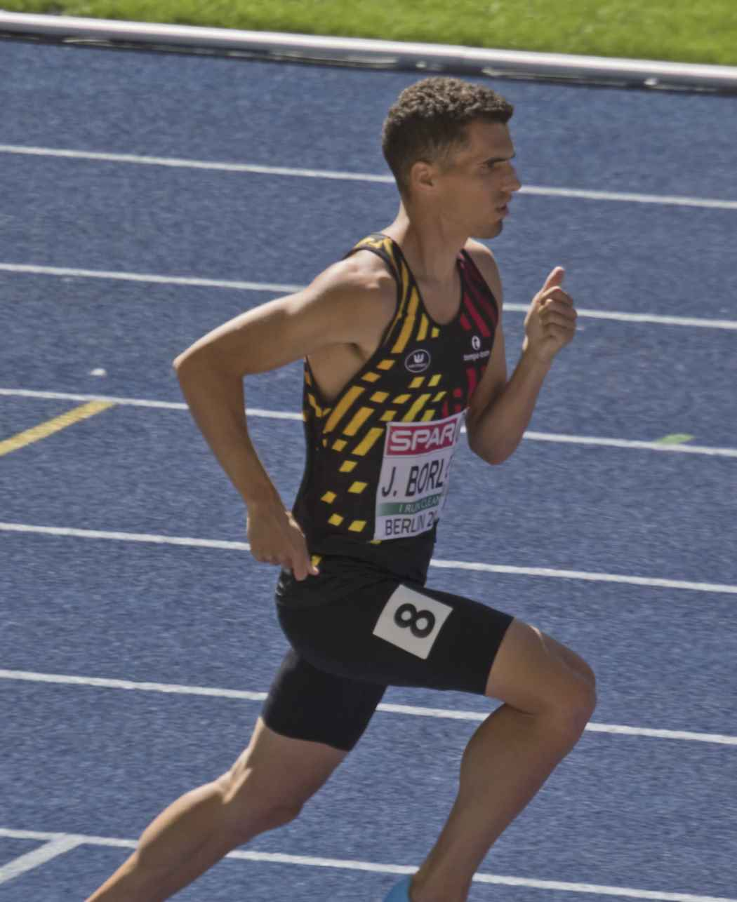 EKB10651 jonathan borlée reeksen